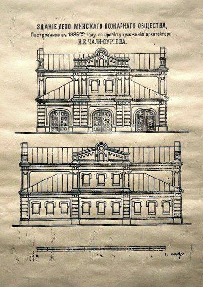 Беларуская (тарашкевіца): Менск (Miensk), Гарадзкі Вал (Haradzki Vał). Пажарнае дэпо